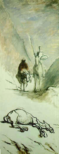 Honoré Daumier, Don Quichotte, illustration du livre de Cervantès